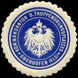 Sealing stamp Title: Kommandantur des Truppenübungsplatzes Oberhofen/Elsaß Description: Place: Oberhofen/Elsaß size: 4 cm